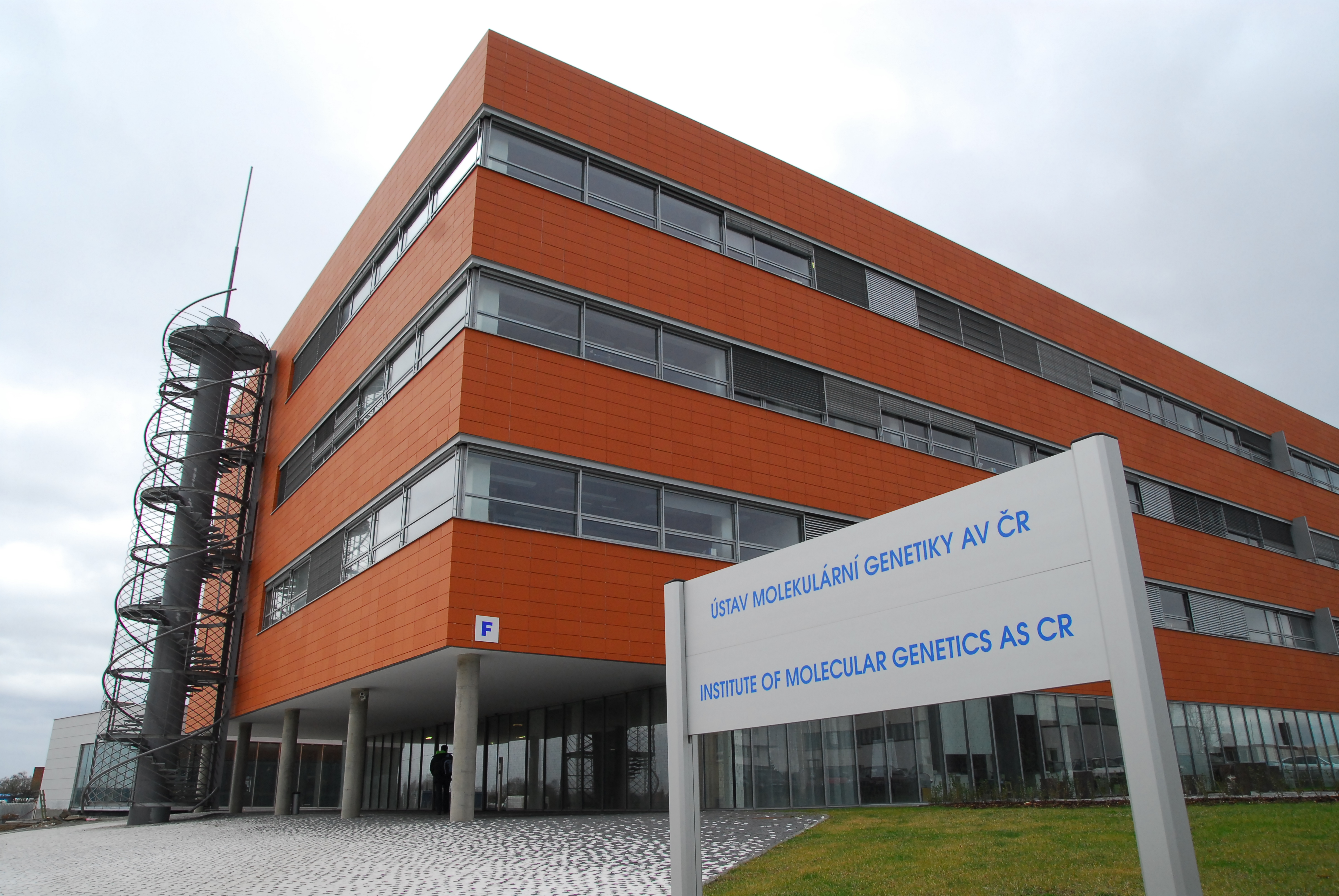 Budova Ústavu molekulární genetiky, ČR.